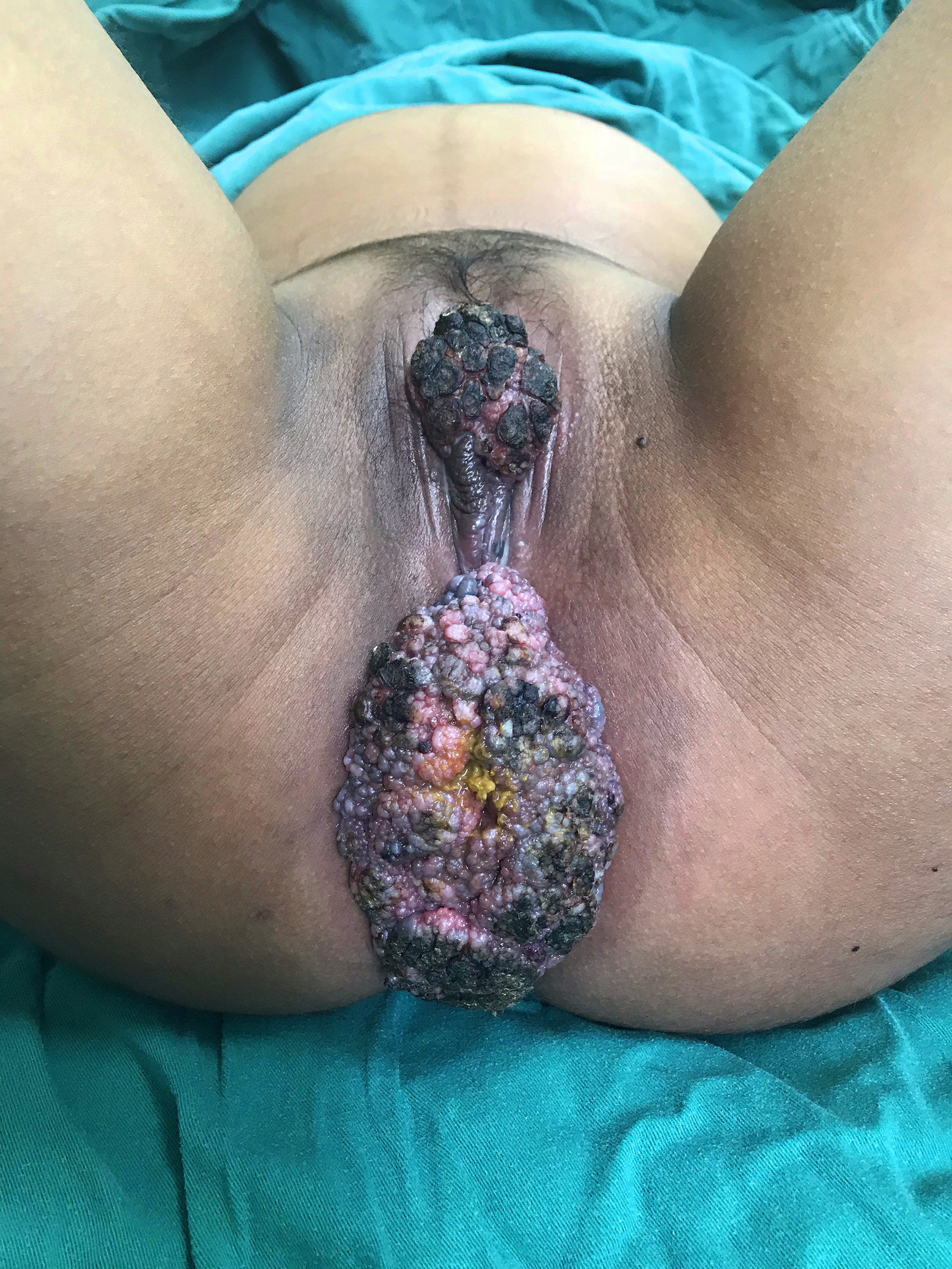 Condylome géant apparut au cours de la grossesse. Ce condylome mesurait 1cm sur 1 cm à 14 semaines.